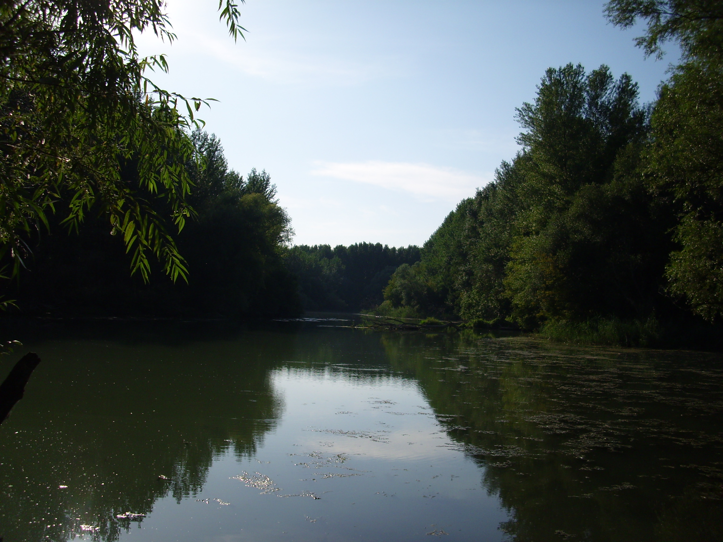 Egyik nagybodaki holtág, a sokból